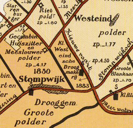 Kleine Westeindsche Polder